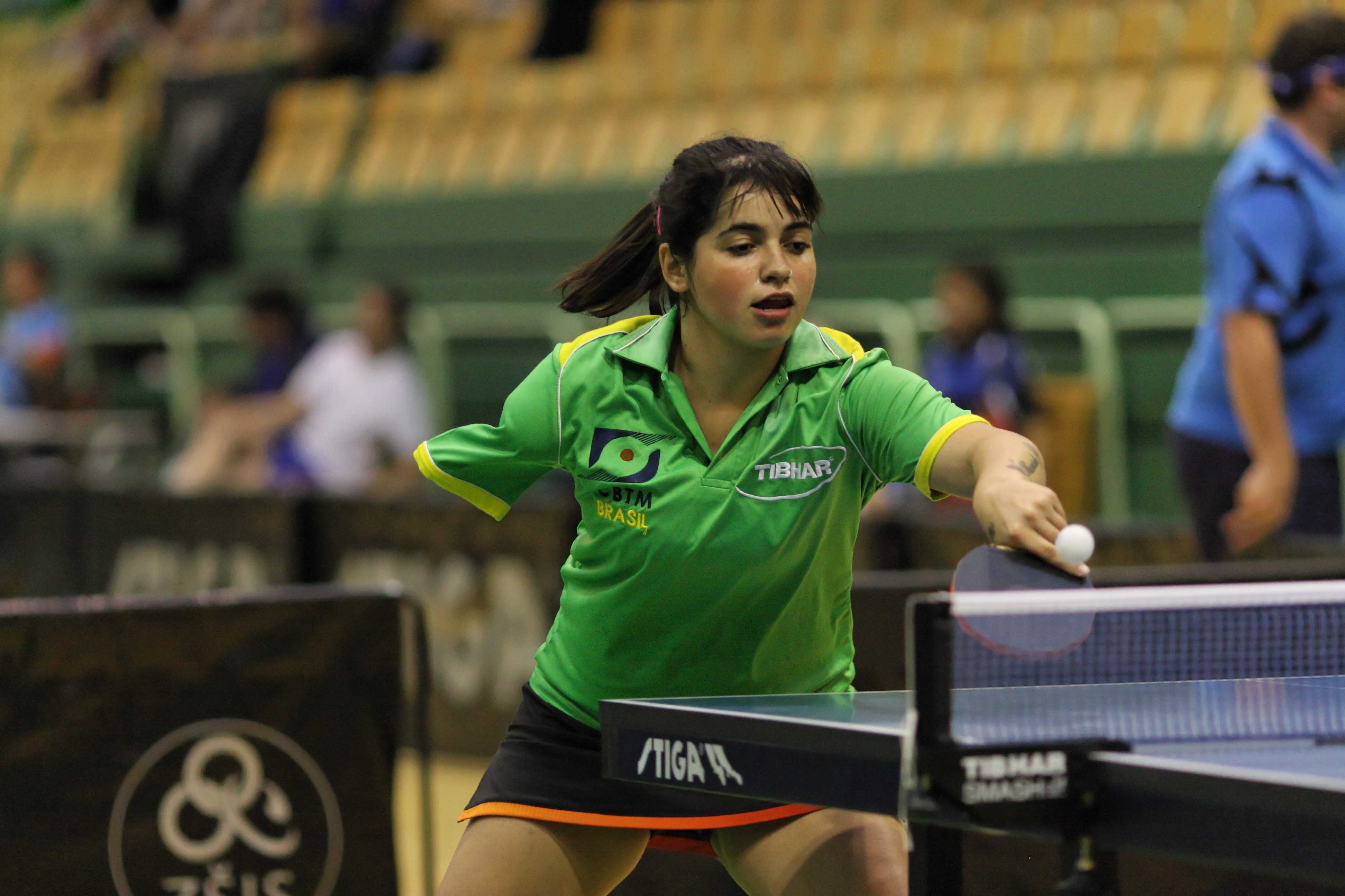 Bruna Alexandre lors de l'Open de Slovénie en 2012.